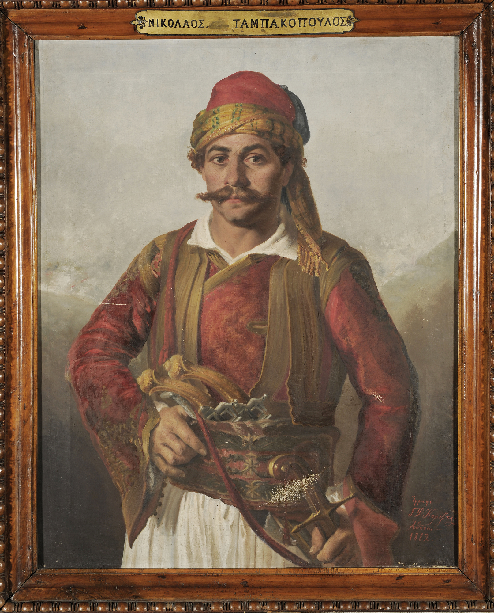 Ο Νικόλαος Ταμπακόπουλος, έργο Γ. Δ. Κορίζη, ελαιογραφία σε μουσαμά, 1 Χ 0,80 μ., 1882